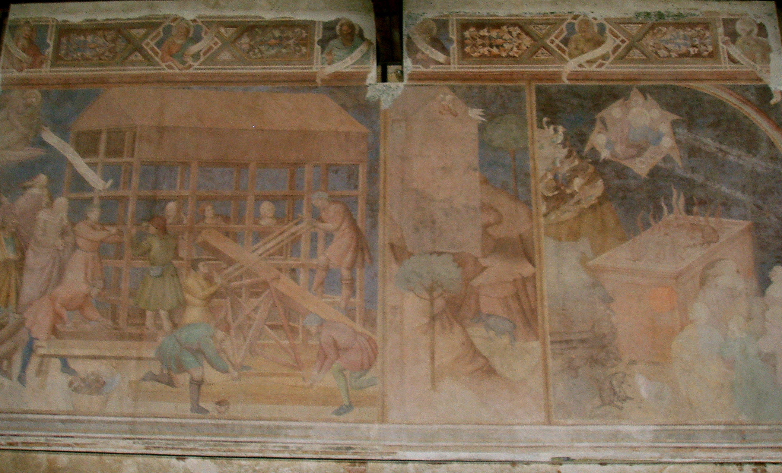 Monumental Camposanto (graveyard) frescos in Pisa, Italy